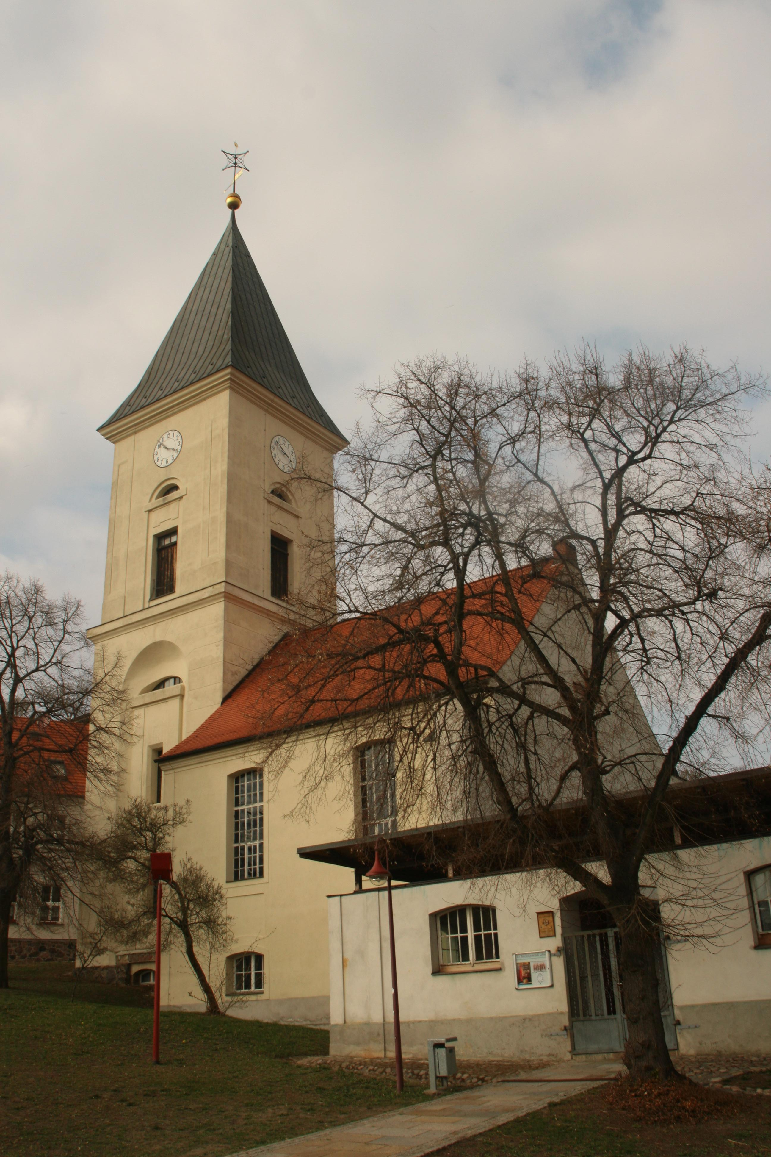 Lebus, Germany